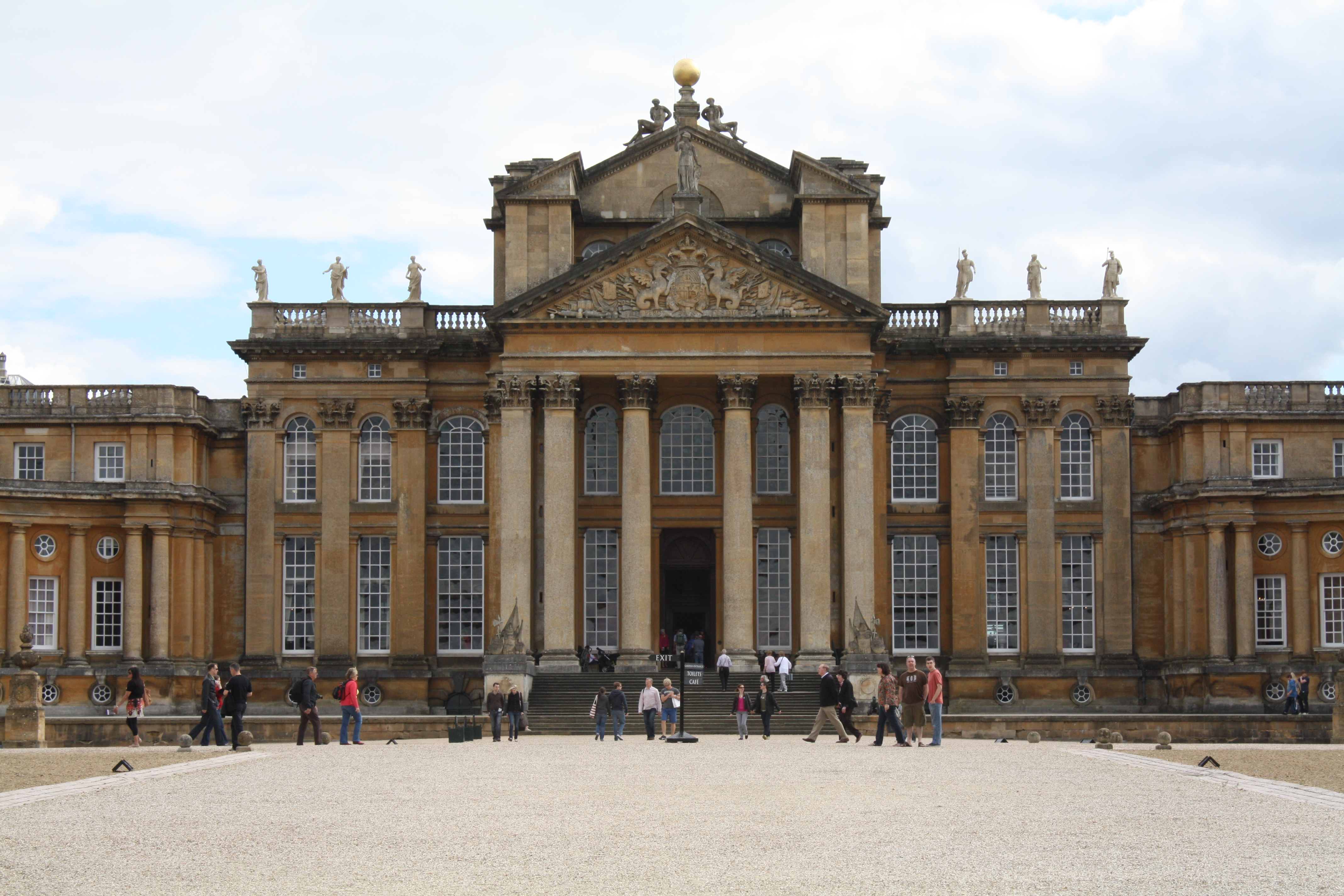 Blenheim Palace